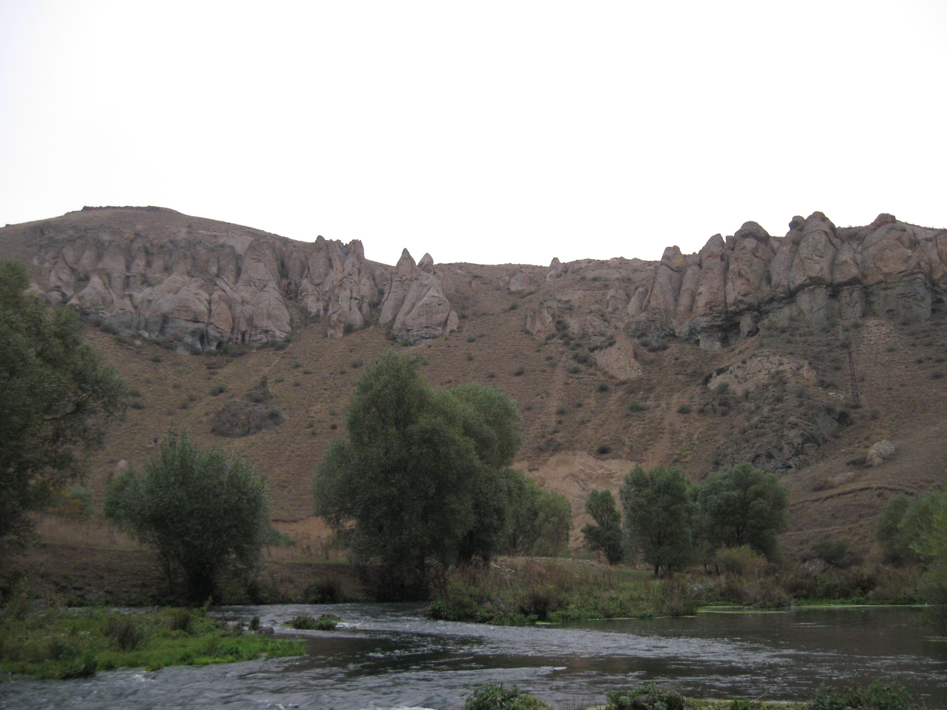 «Հերթ» որմնաքանդակ